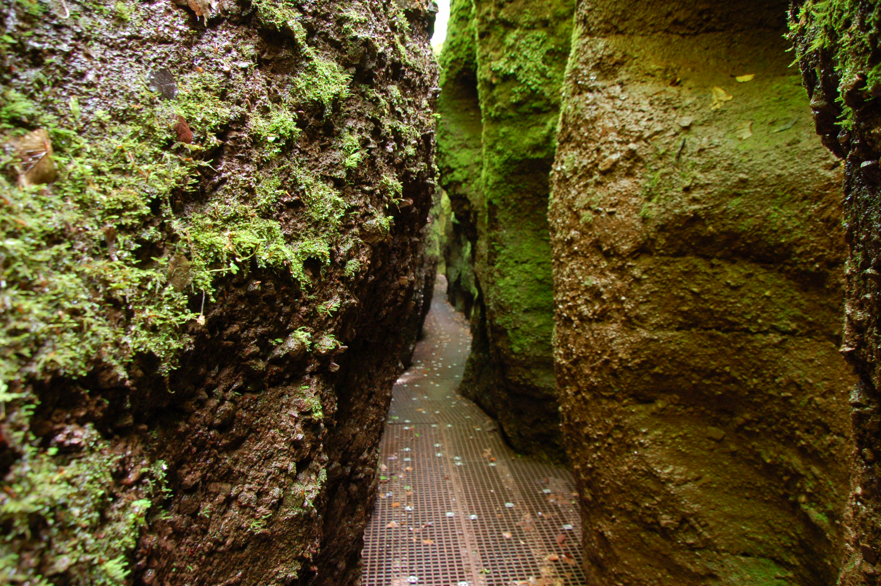 Engstelle am Weg durch die Drachenschlucht; NSG Wartburg–Hohe Sonne